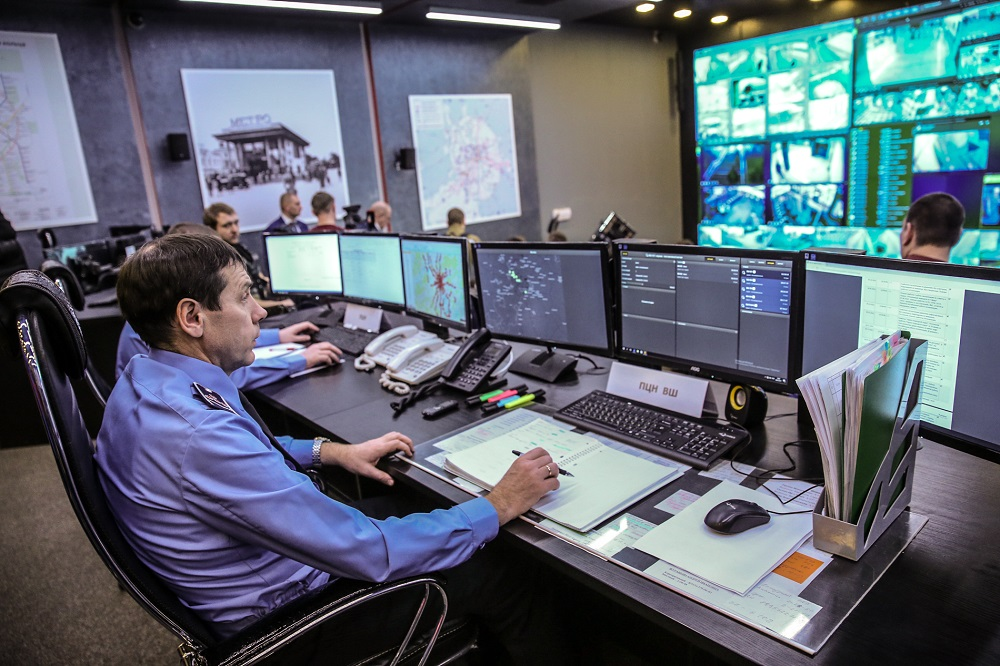 Центр управления обеспечением транспортной безопасности Московского метро